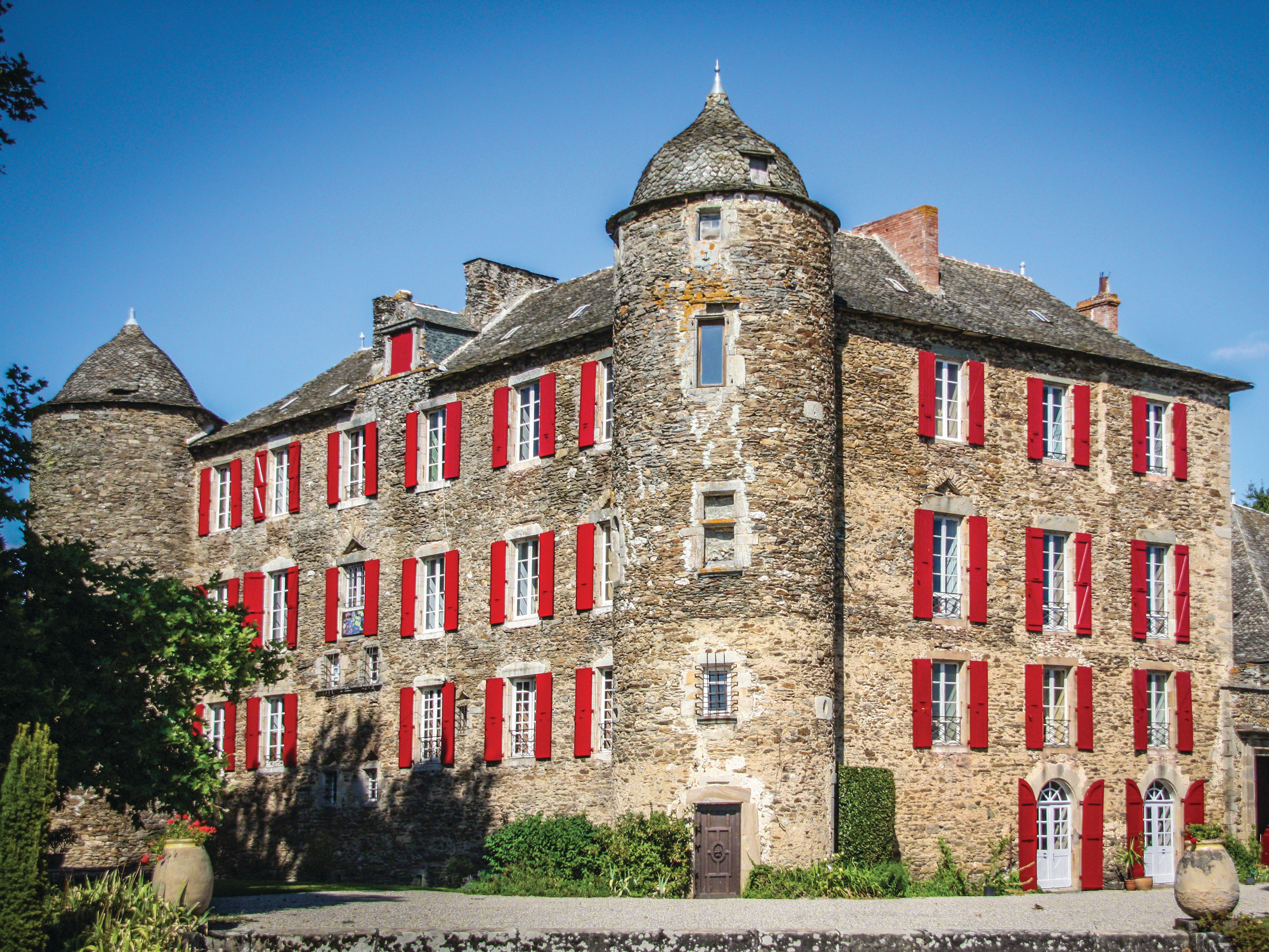 Les tours du Château du Bosc, avec tous ses volets rénovés en 2016. Façades Sud et Ouest. .